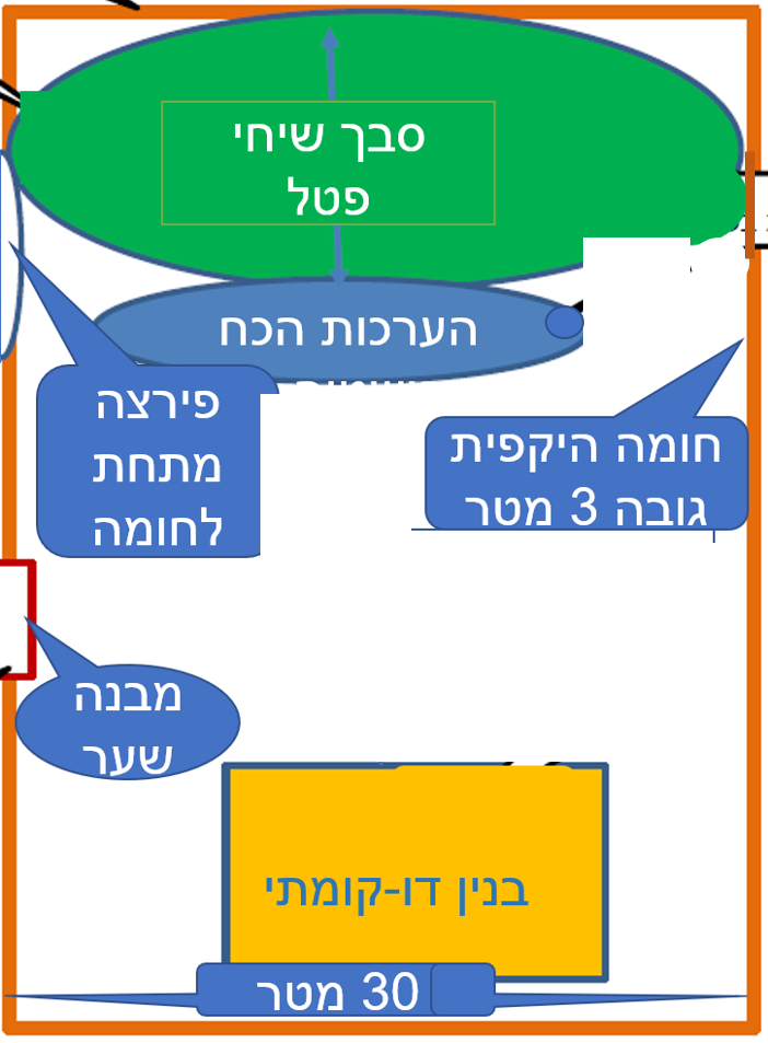 תרשים מתחם מפקדת המחבלים ברס א-שק יעד מרכזי לפשיטה במבצע מתח גבוה